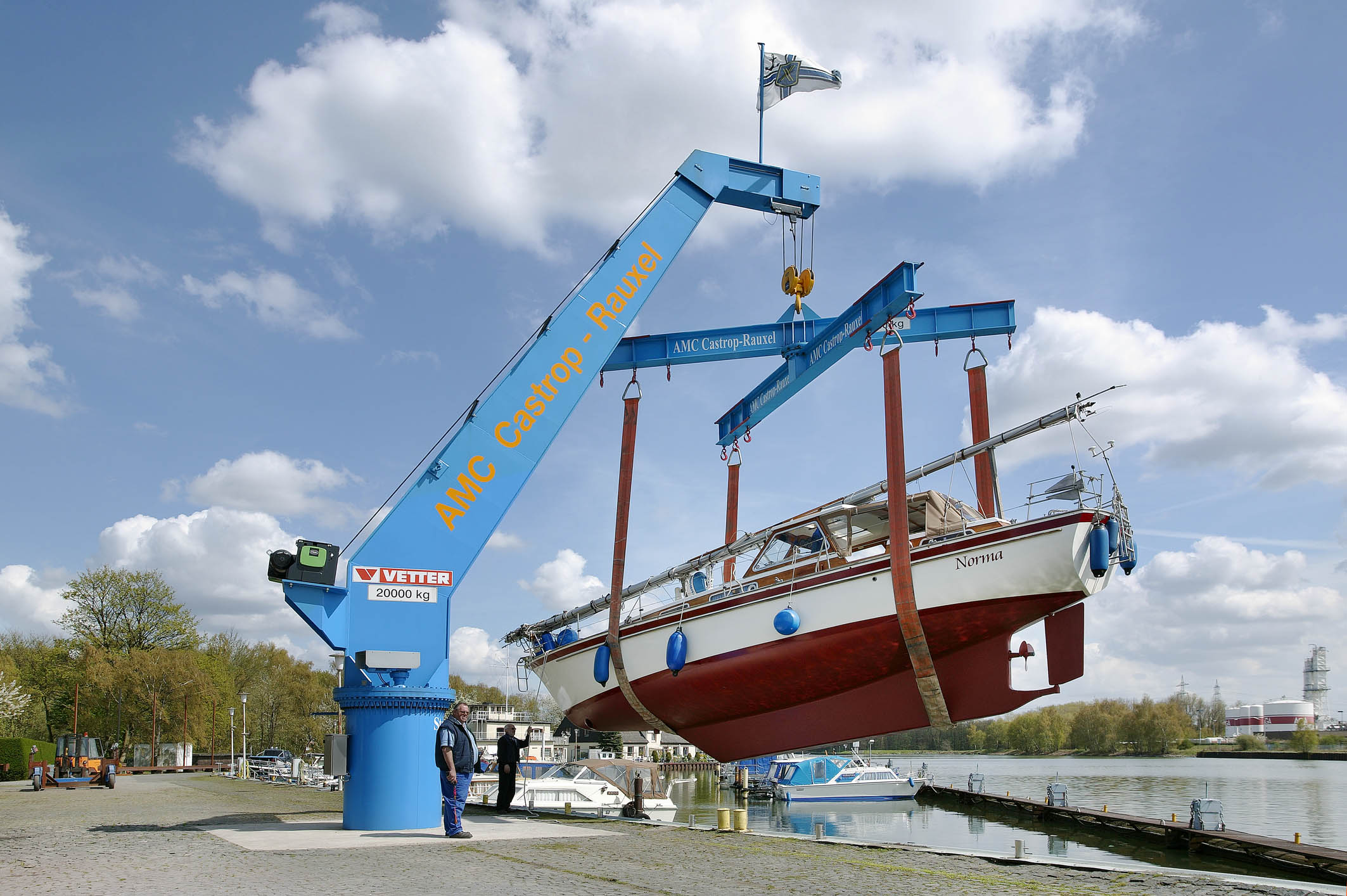 Bootskran Typ Maat vom AMC Castrop Rauxel